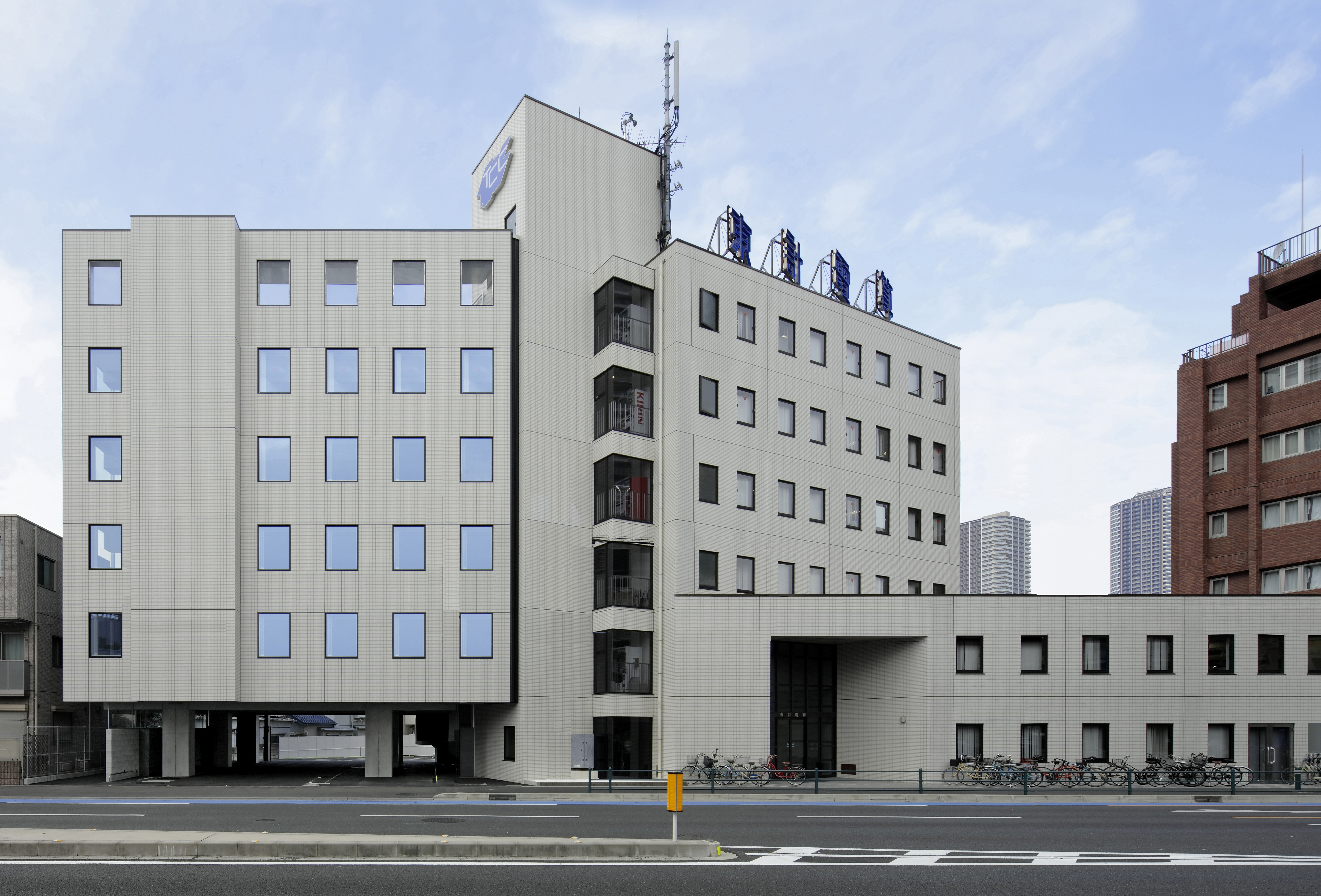 東計電算本社社屋